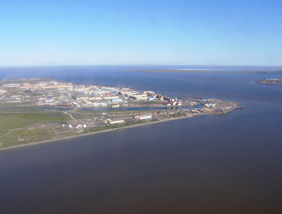 Anadyr from helicopter